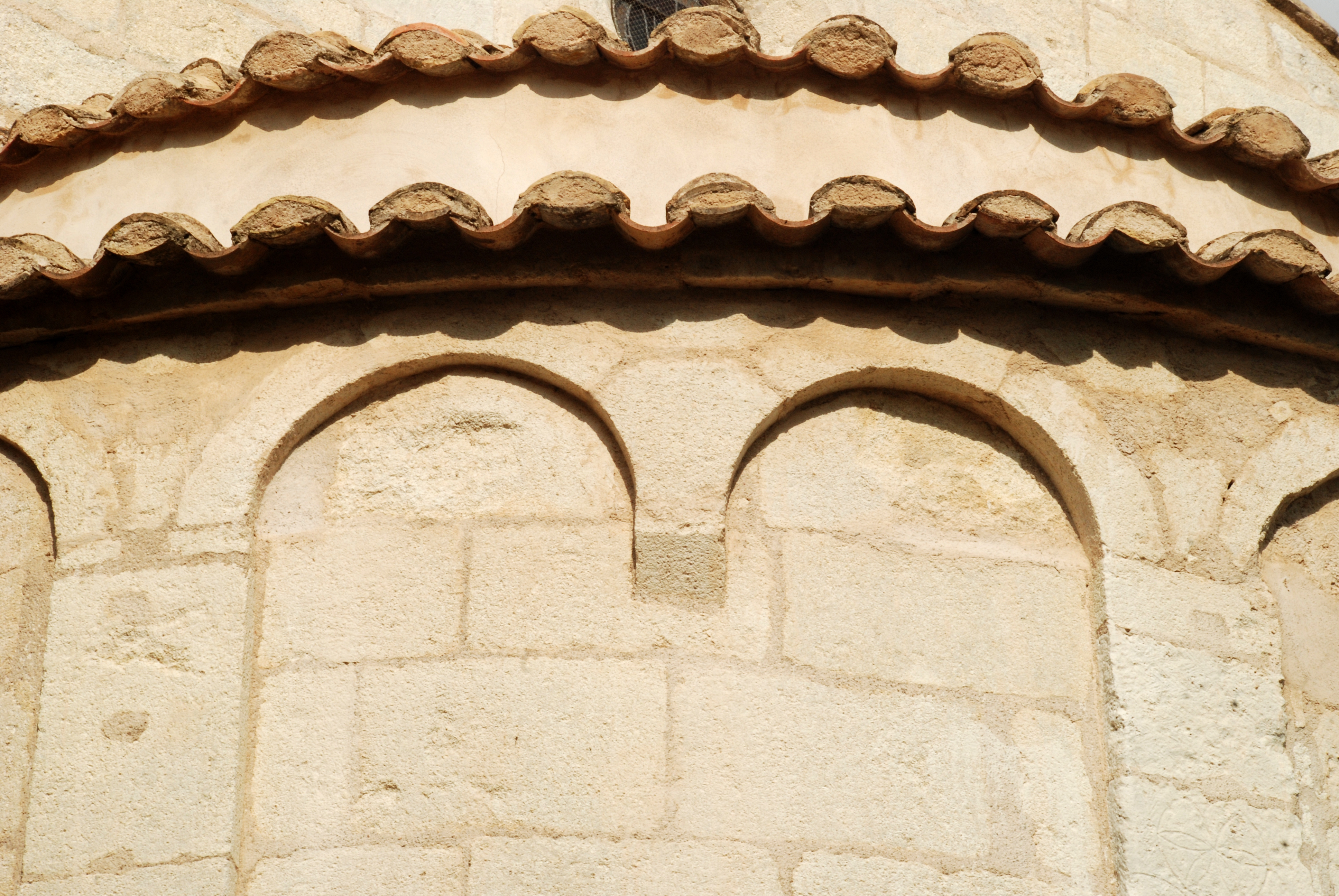 France - Languedoc - Hérault - Église Sainte-Agathe de Valergues